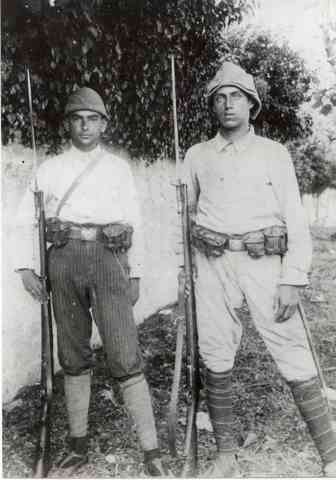 דוד בית הלחמי ושמואל ייבין עם רובים, בתקופת הצוערות